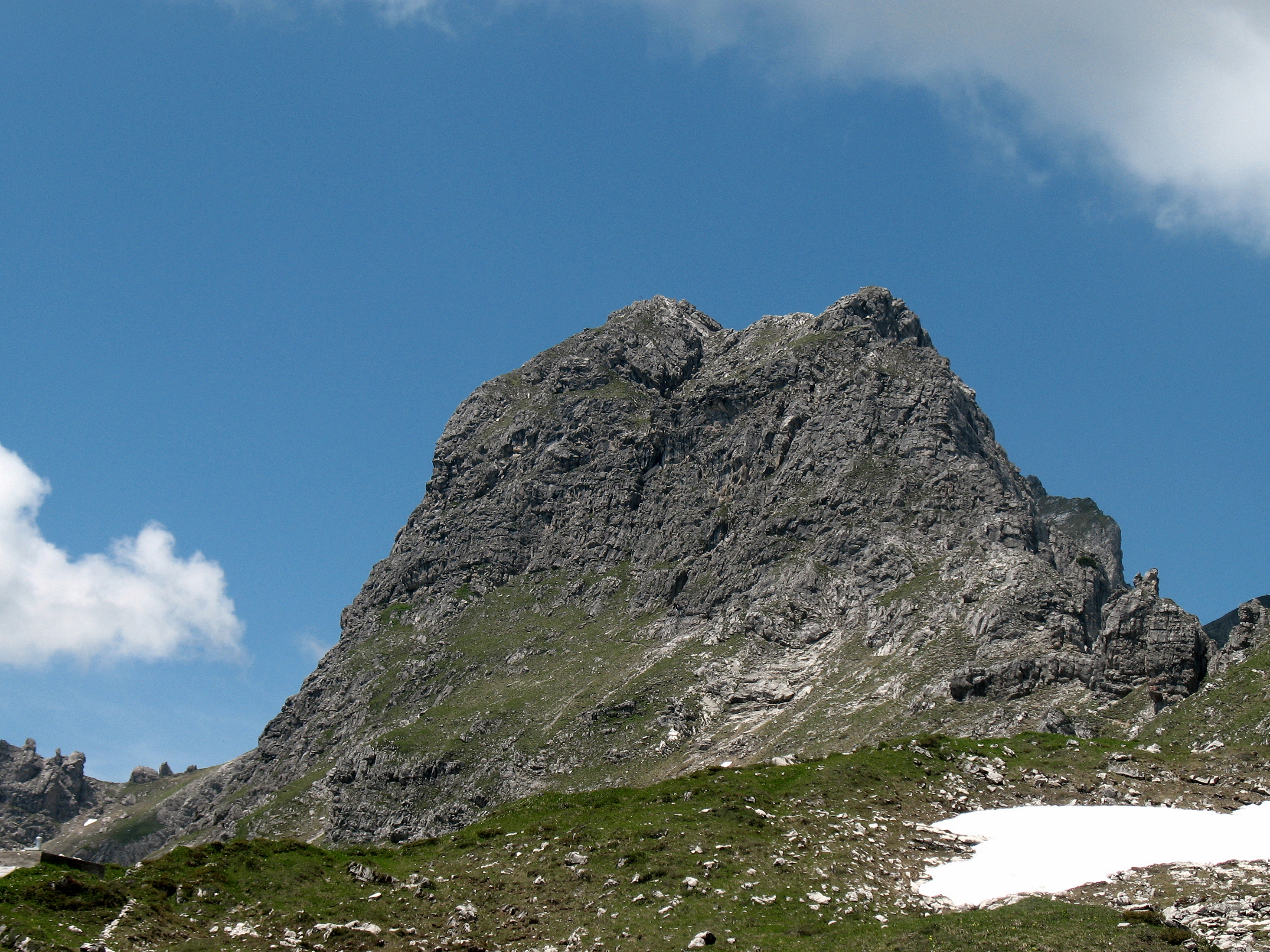 Angererkopf (2263 m) von der Mindelheimer Hütte (2013 m).